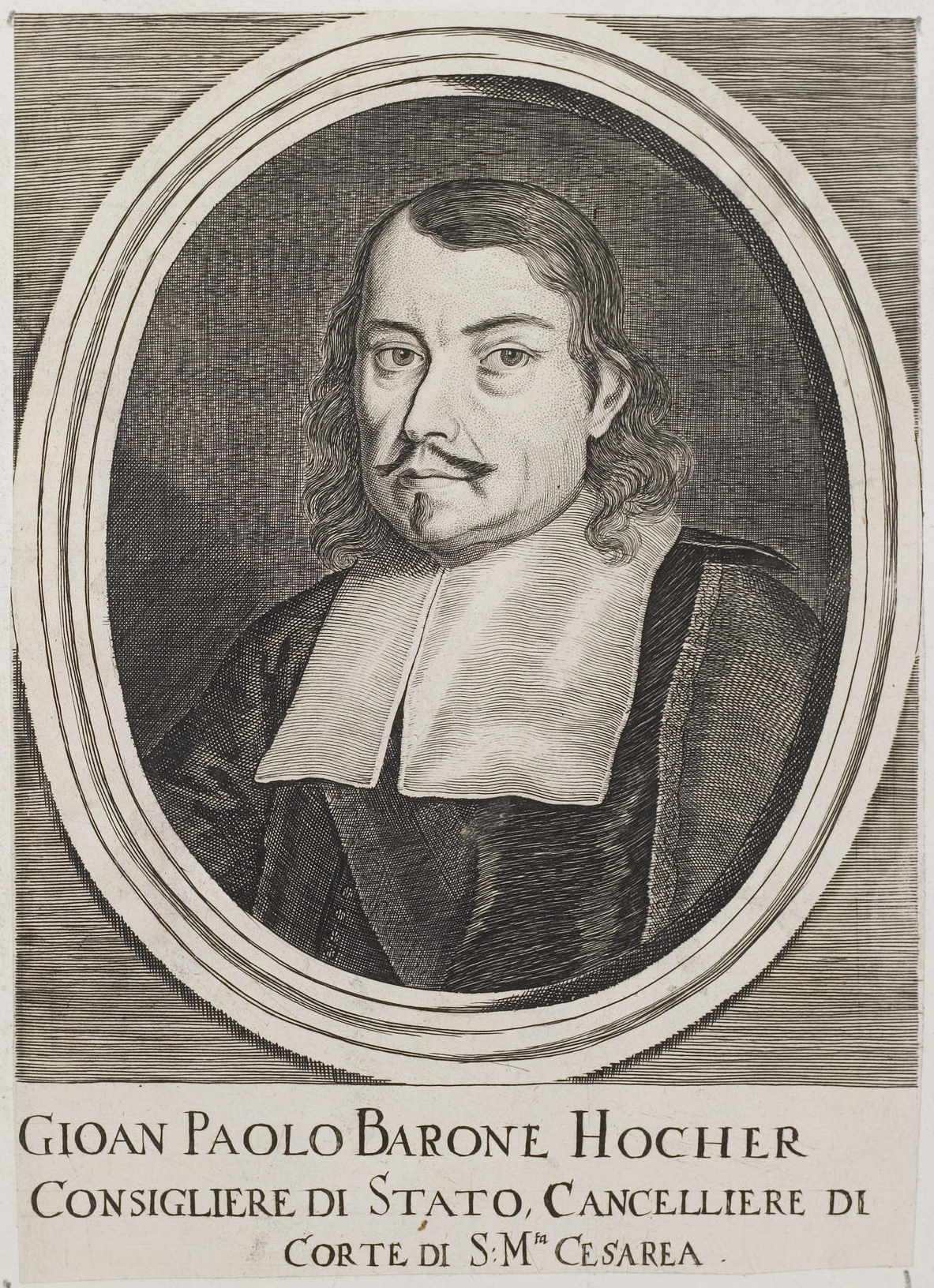 Grafik aus dem Klebeband Nr. 2 der Fürstlich Waldeckschen Hofbibliothek Arolsen Motiv: Johann Paul Hocher, österreichischer Jurist und Oberster Hofkanzler des Kaisers Leopold I.